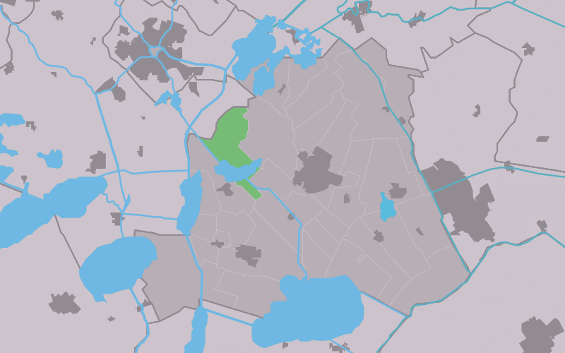 Kaartsje fan himrik fan Boarnsweach